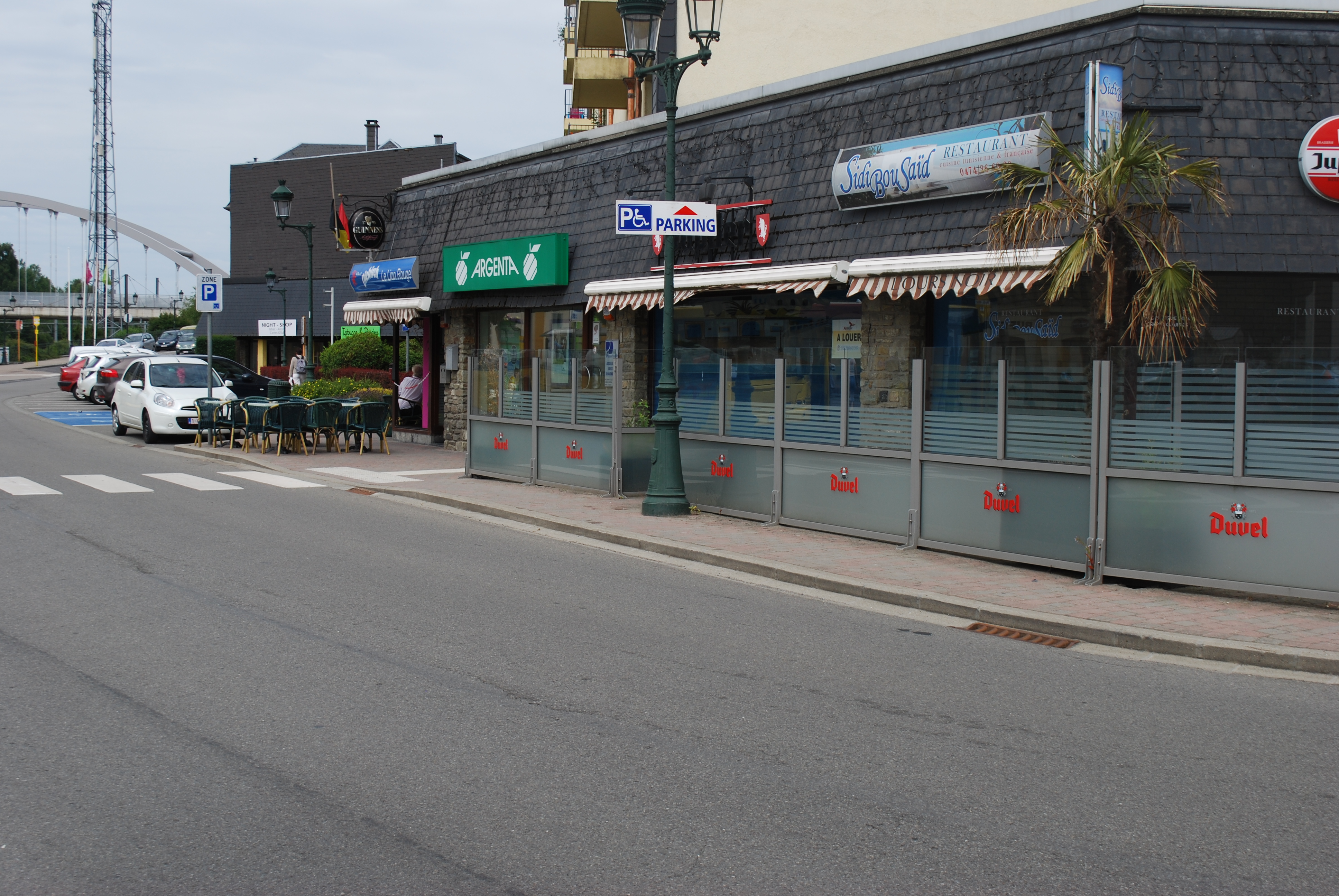 Vue de Libramont.